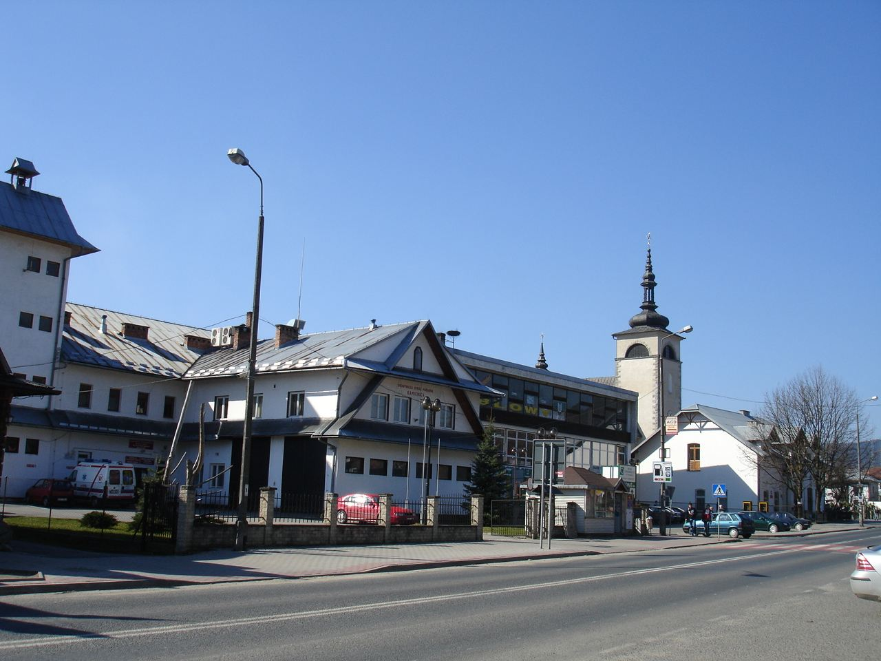 Village Kamienica, main street